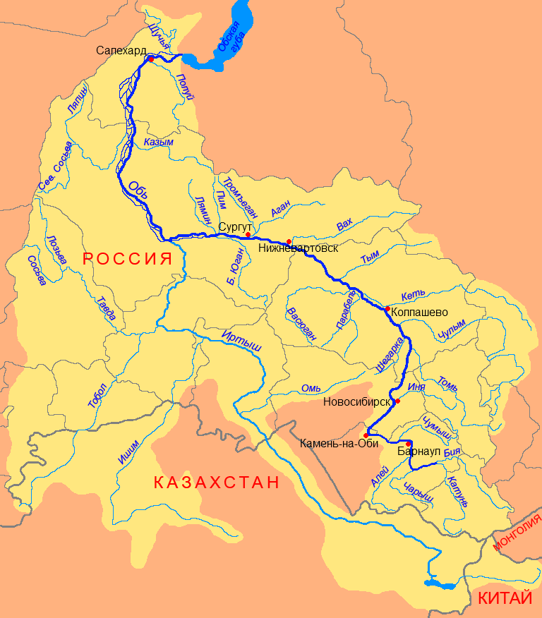 Схема бассейна реки Обь